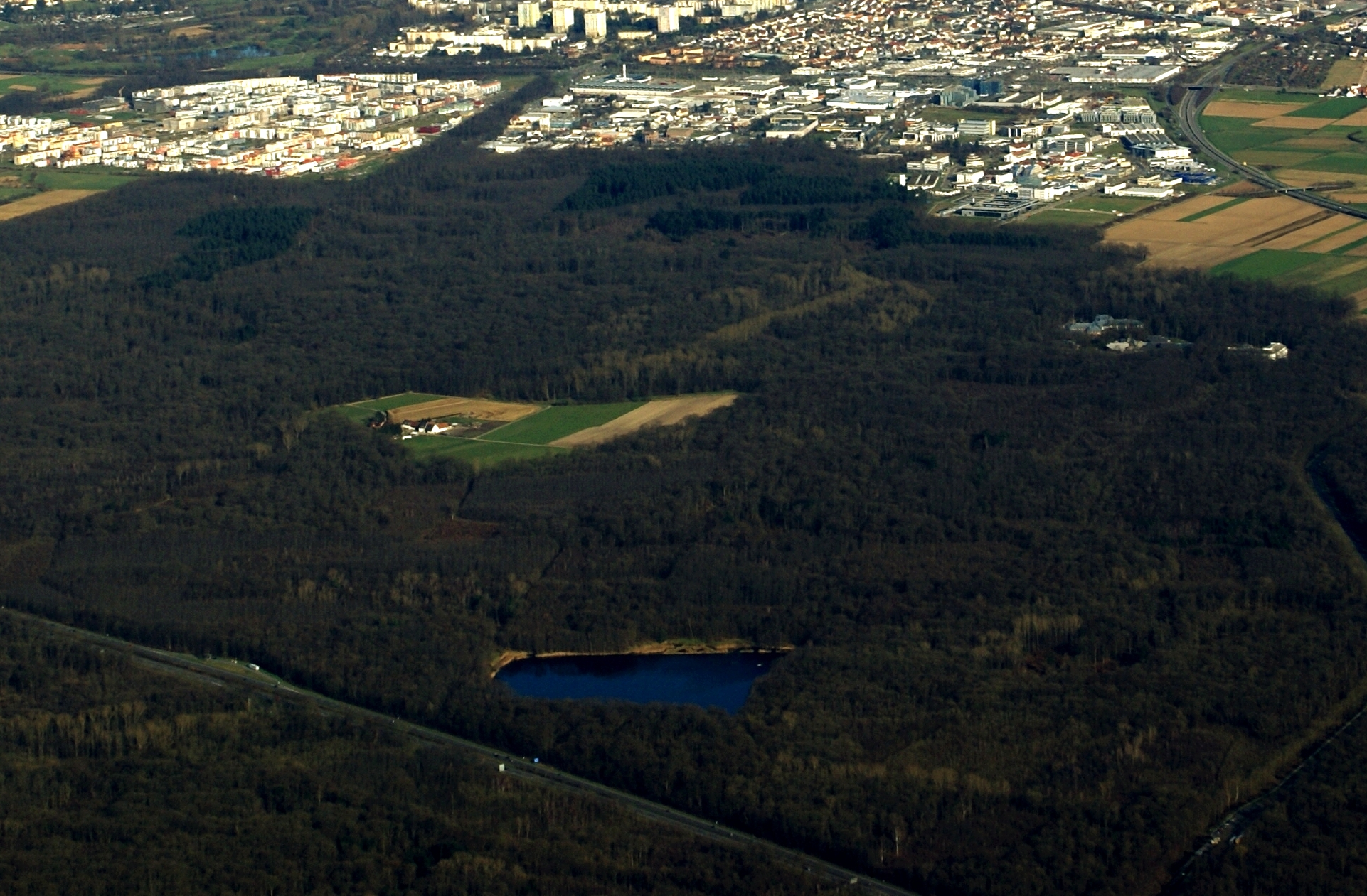 Das Luftbild zeigt den Arlesheimer See im Mooswald bei Freiburg